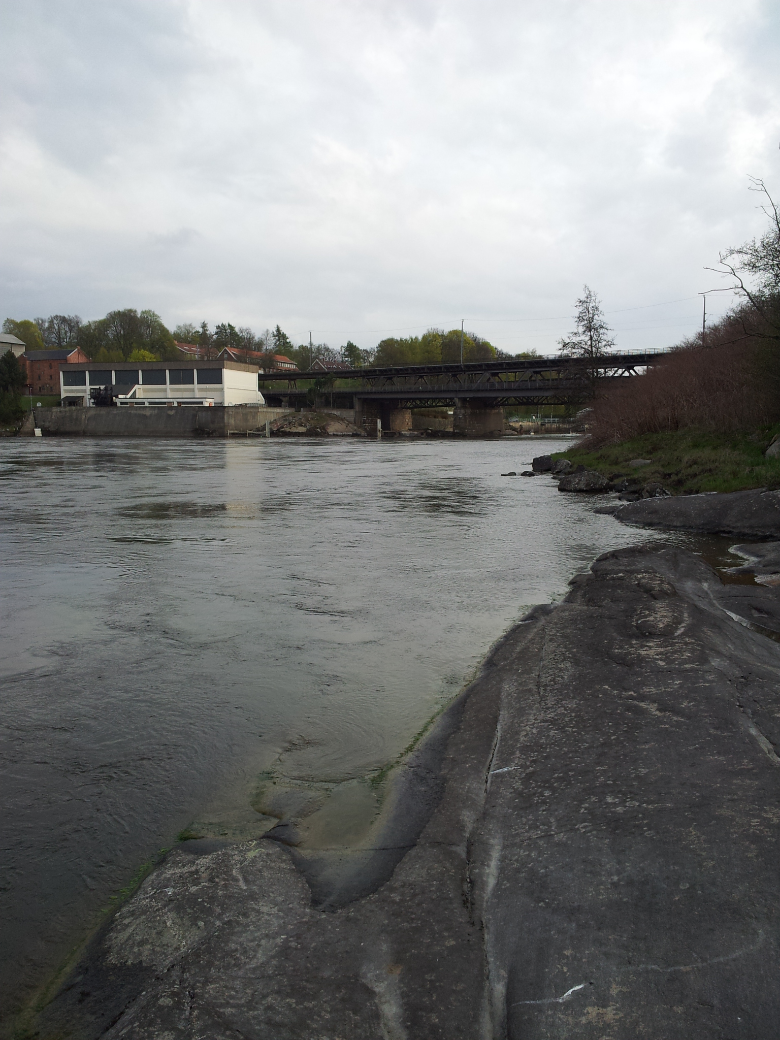 Sarp kraftverk